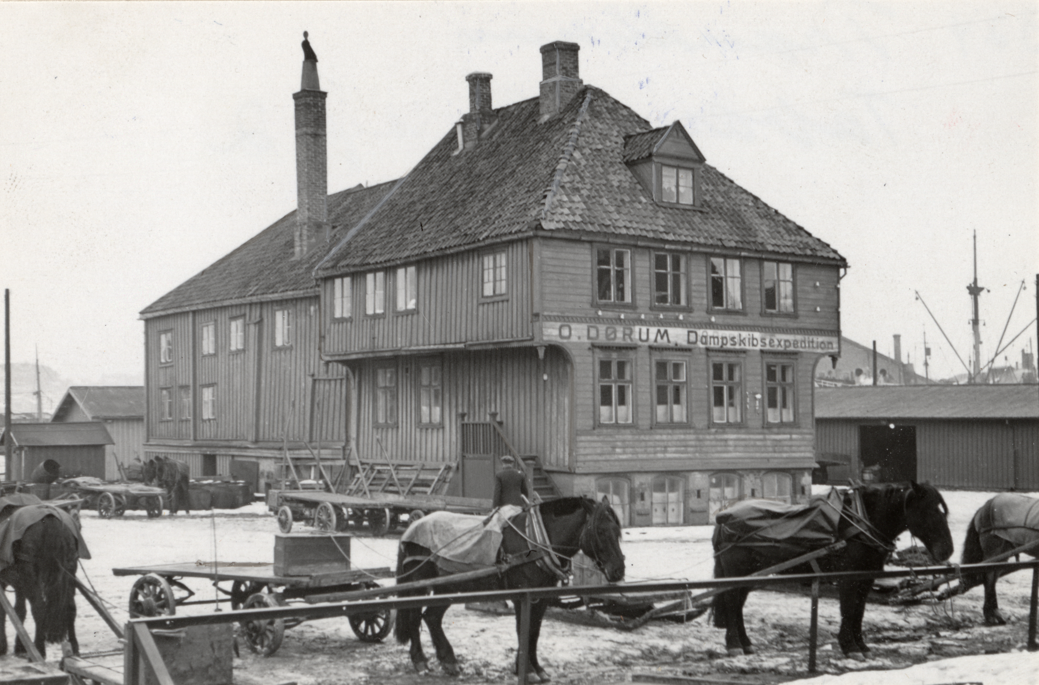 Tavern (Taværn) i Strinda, Sør-Trøndelag Flytter fra Fjordg. 2, Trondheim. This image on crowdsourcing geotagging platform Fotodugnad